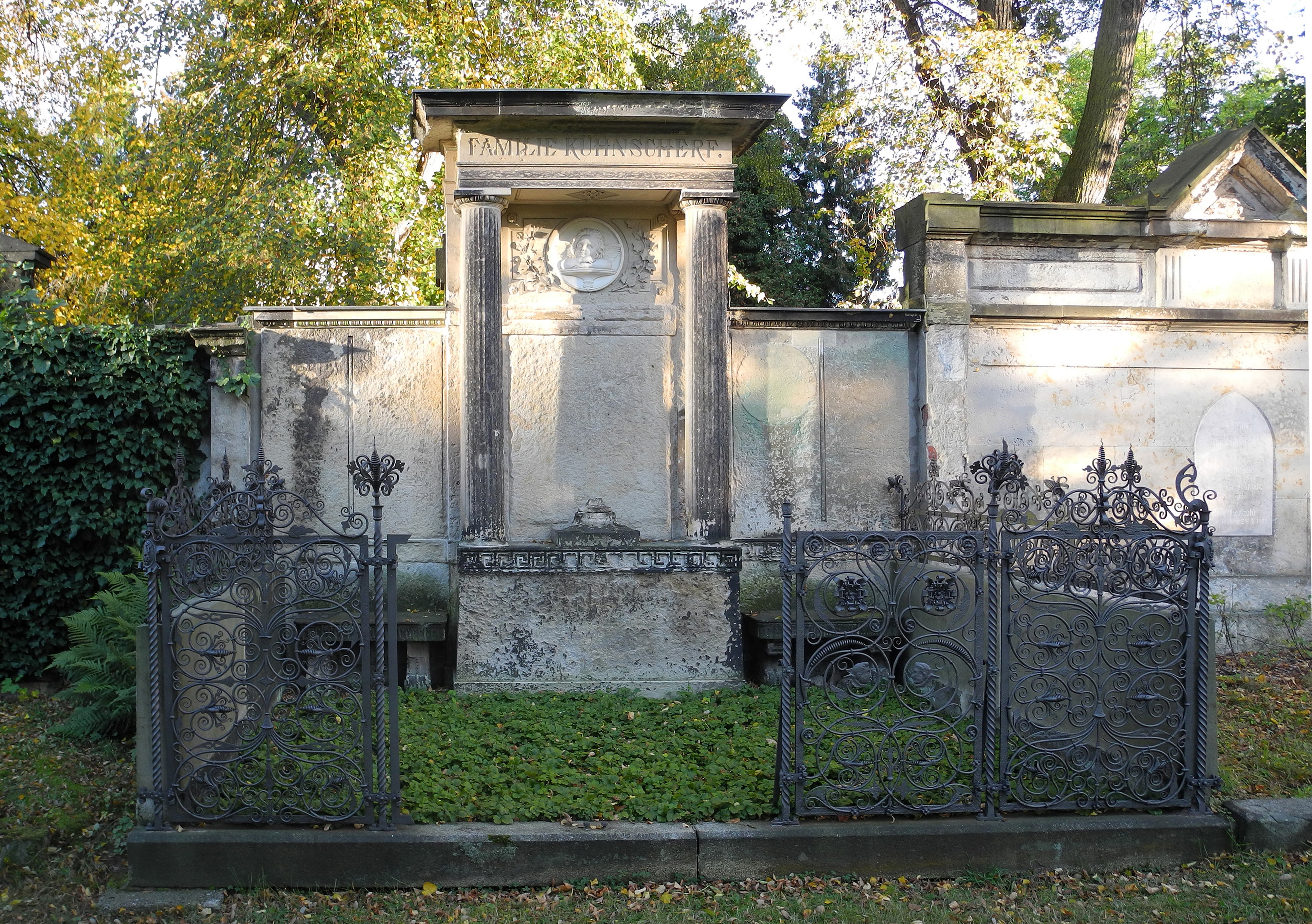 Alter Annenfriedhof in Dresden-Südvorstadt, restaurierte Grabstätte der Familie Kühnscherf: Carl Friedrich August Kühnscherf (1808–1879), Schlossermeister und Gründer der Firma "August Kühnscherf und Söhne" (1873) in Dresden, Große Plauensche Straße 20 bis 26